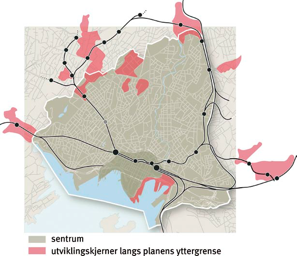 Indre by i Oslo og utviklingsområdene rundt. Utgitt av PBE i 2005 i "Kommunedelplan for byutvikling og bevaring i indre Oslo 2005 - 2020"